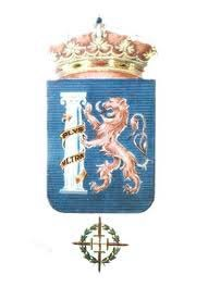 Escudo de armas del Regimiento de Infantería Extremadura nº 15